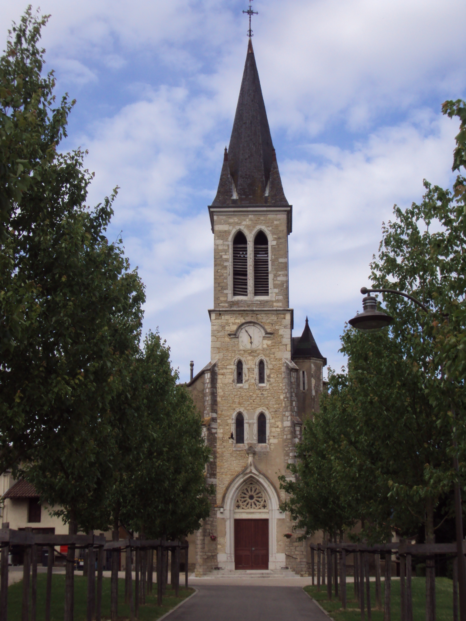 Église Saint-Clair de Montagnat, Ain, France.